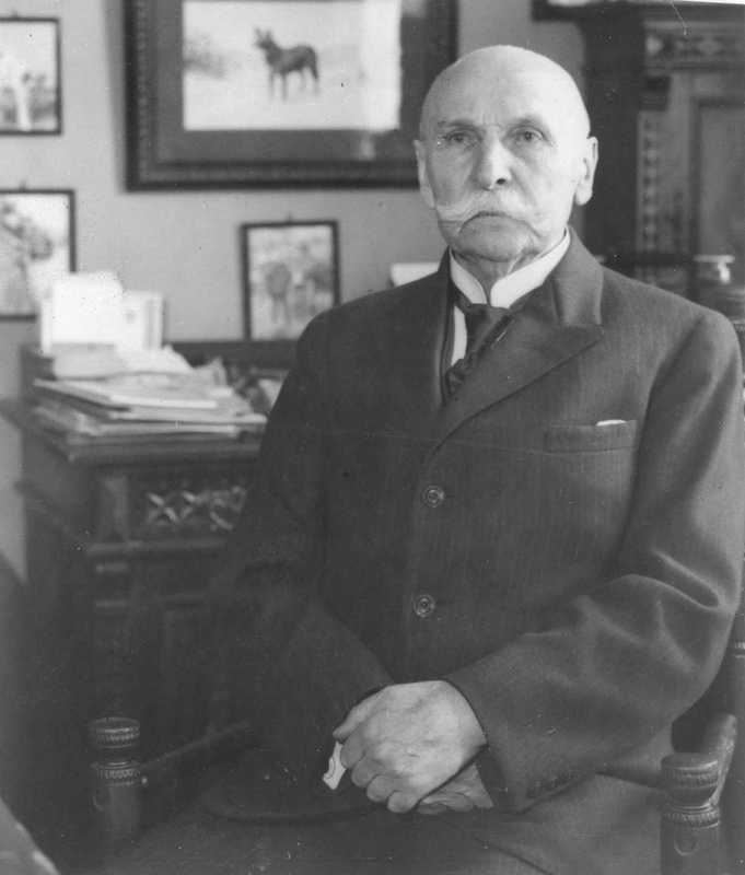 Fritz Huitfeldt, ca 1930